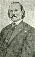 Eli Metcalfe Bruce, (1828-1866), American Confederate financier